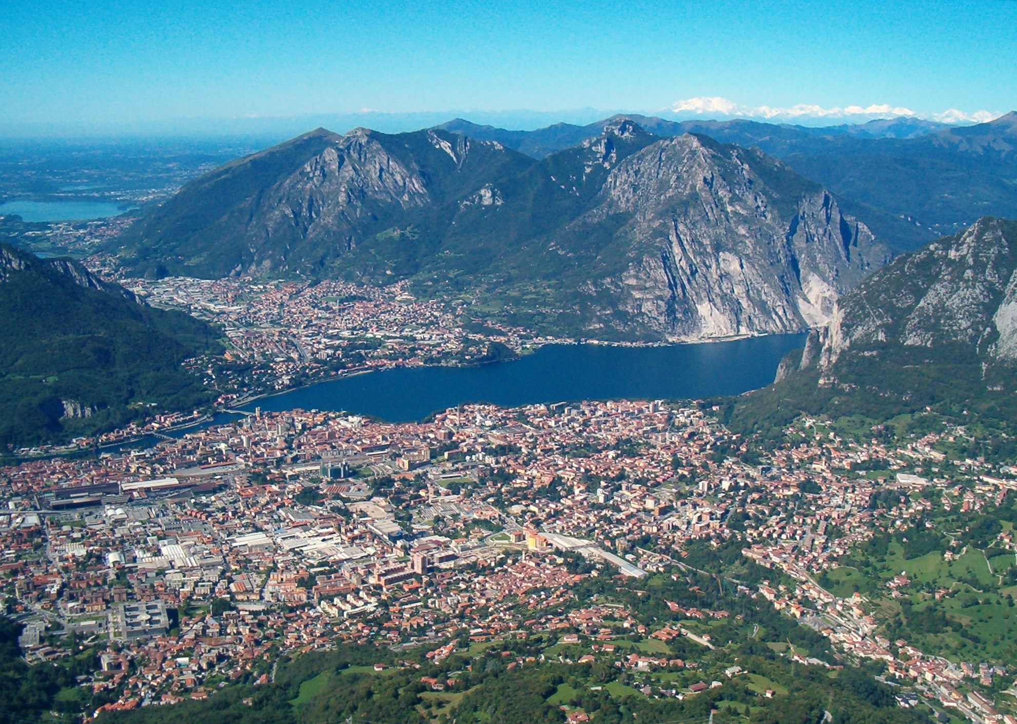 Panorama di Lecco dai Piani d'Erna, Resegone Date:31 agosto 2006